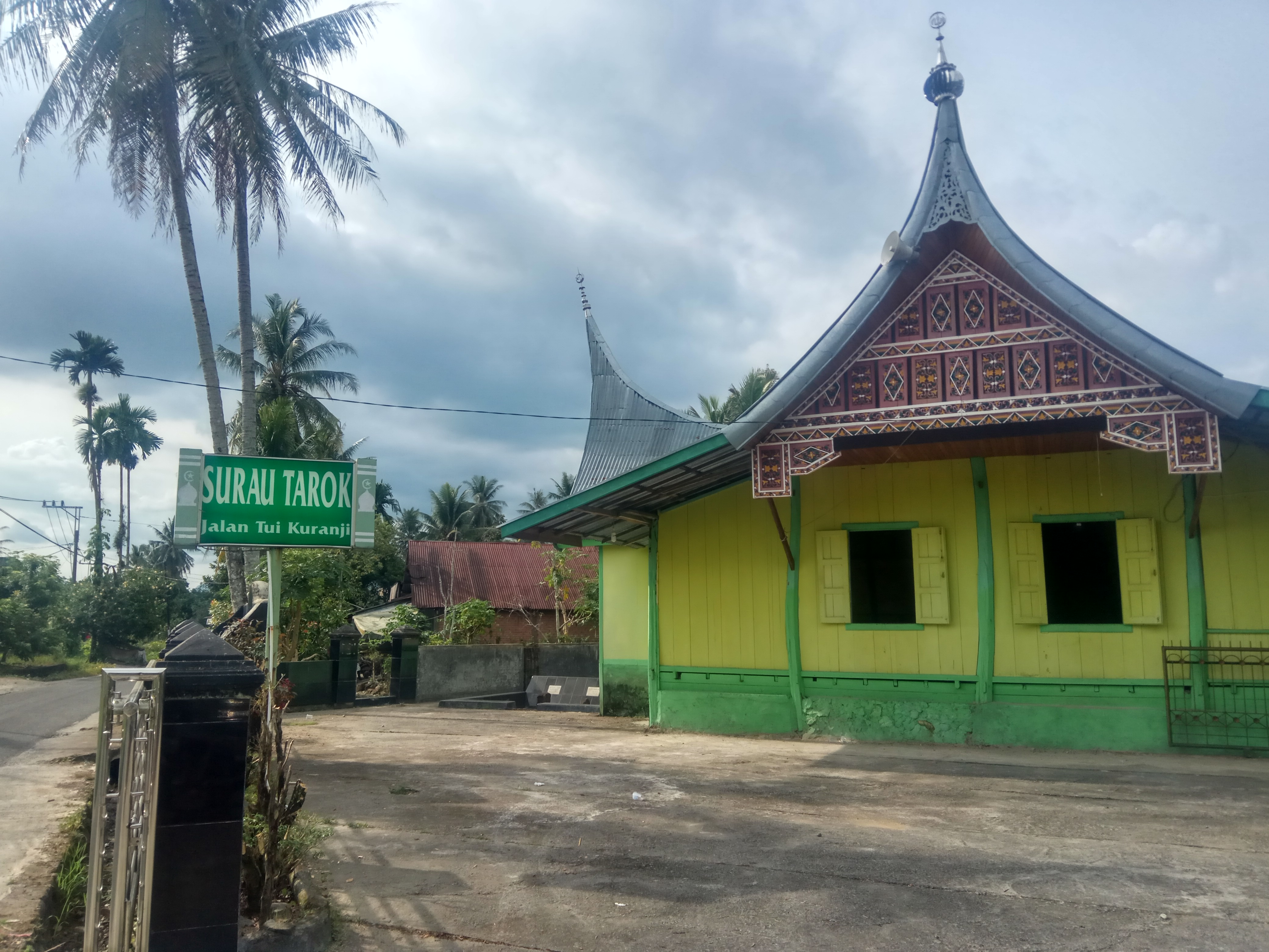 Surau Tarok Tui Kuranji 2019